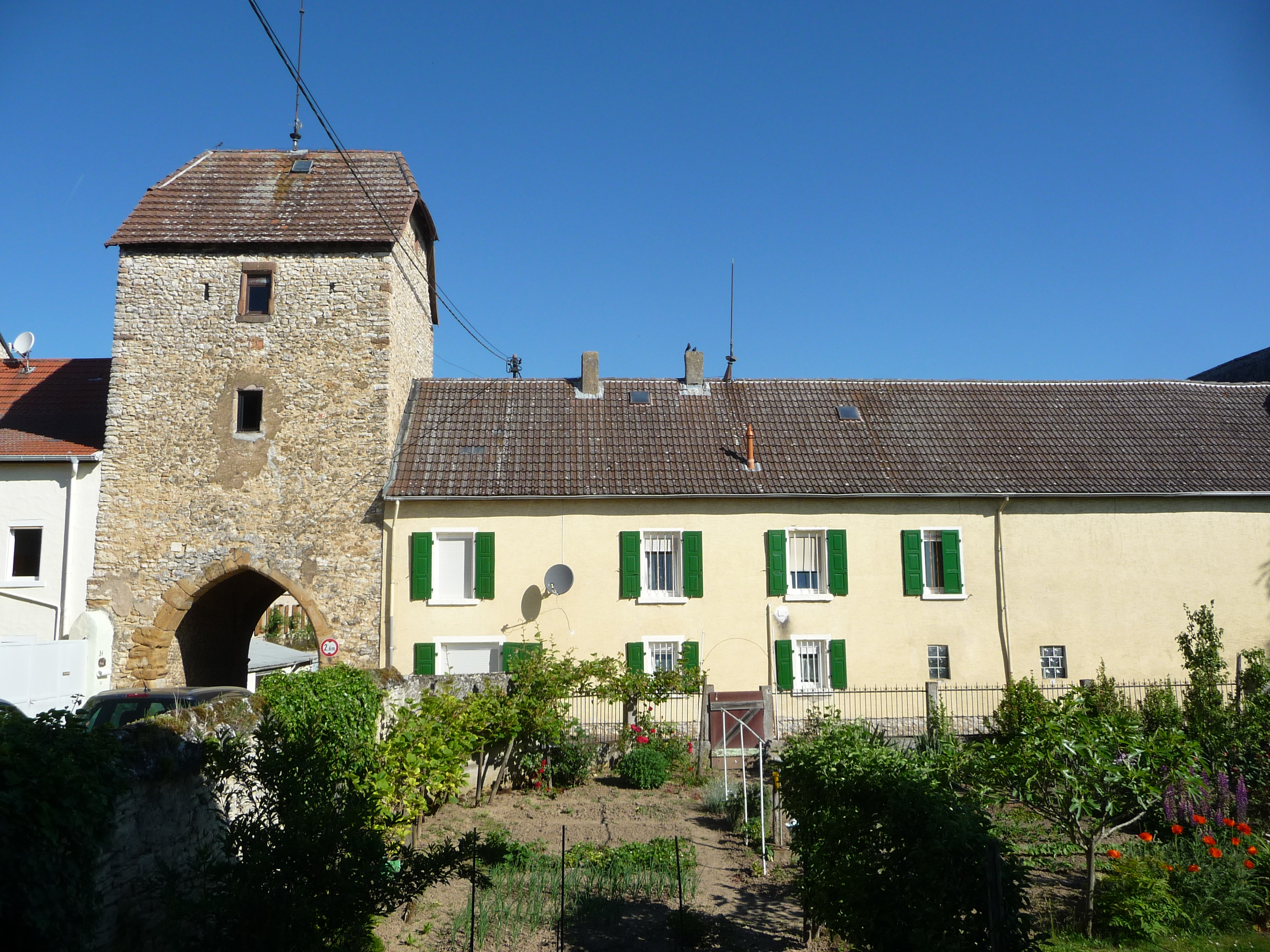 Von der Deutschordenskommende Ober-Flörsheim blieben das barocke, schlossartige Komturhaus, die gegenüber liegende Schaffnerei, ein mittelalterlicher Torturm und Reste der Wehrmauern des Kommendenbezirks erhalten.